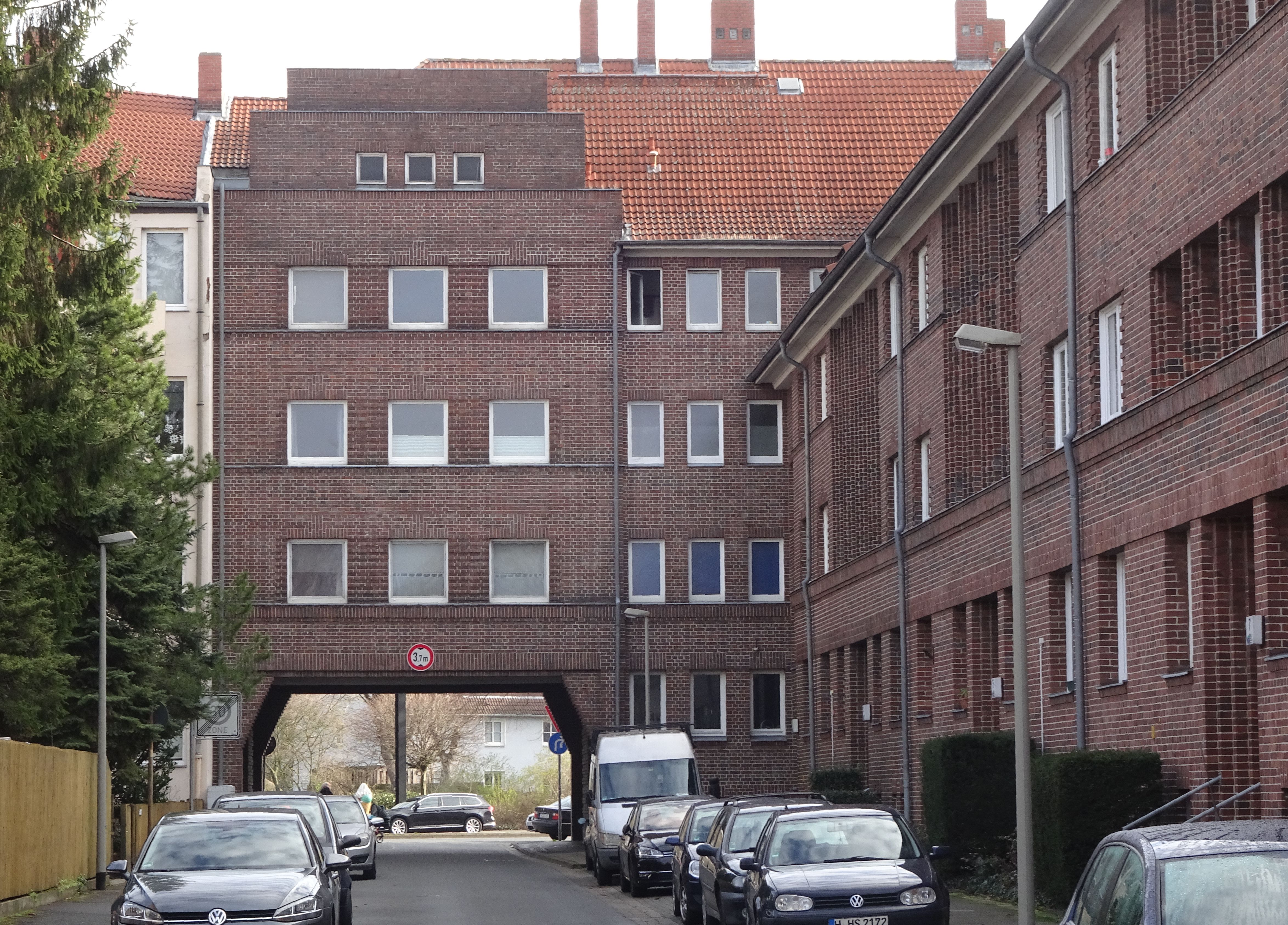 Straße "Hasenberg" in Hannover